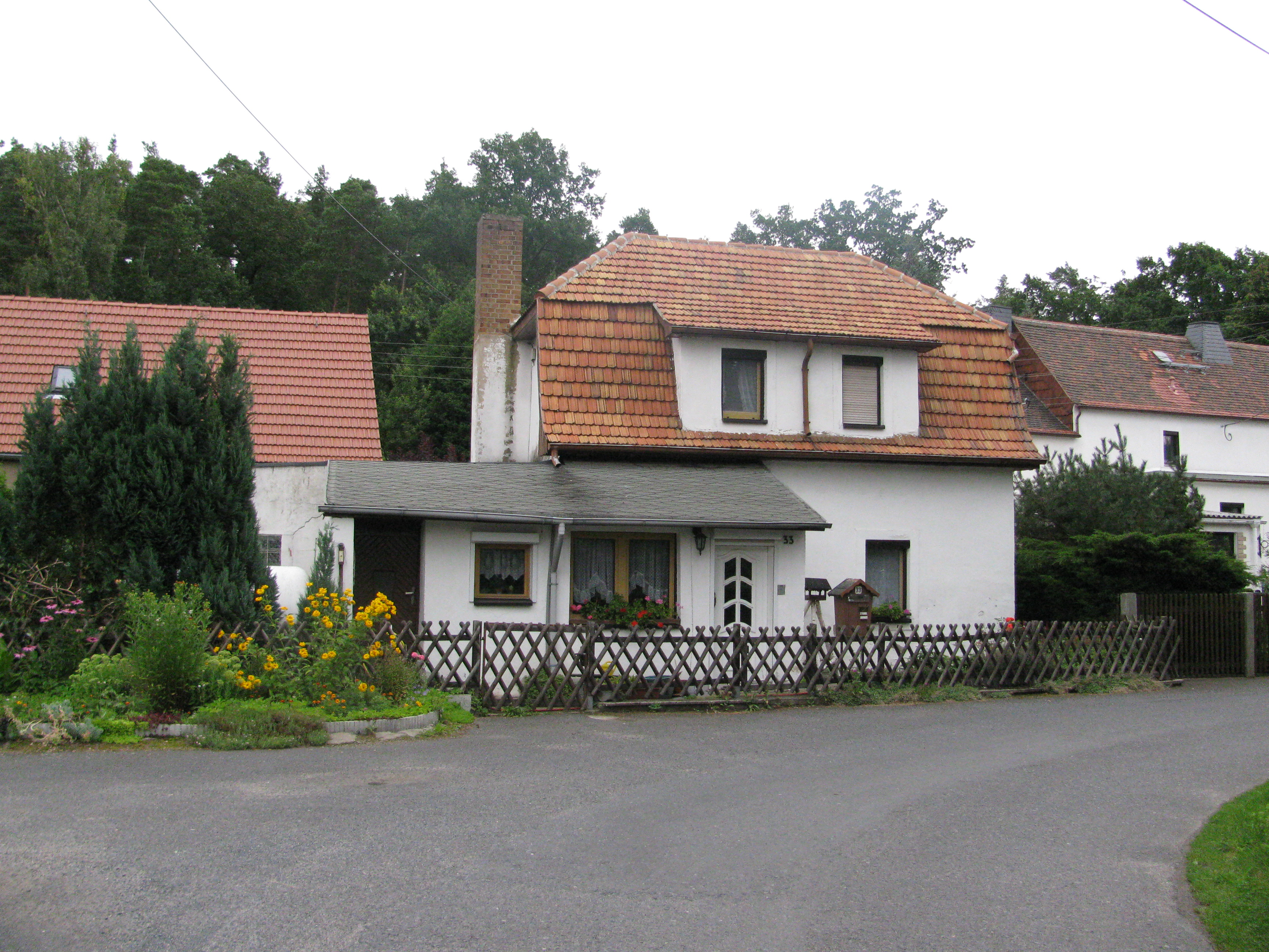 Häusleranwesen im Ortsteil Neuer Anbau, Weinböhla, Landkreis Meißen, Sachsen